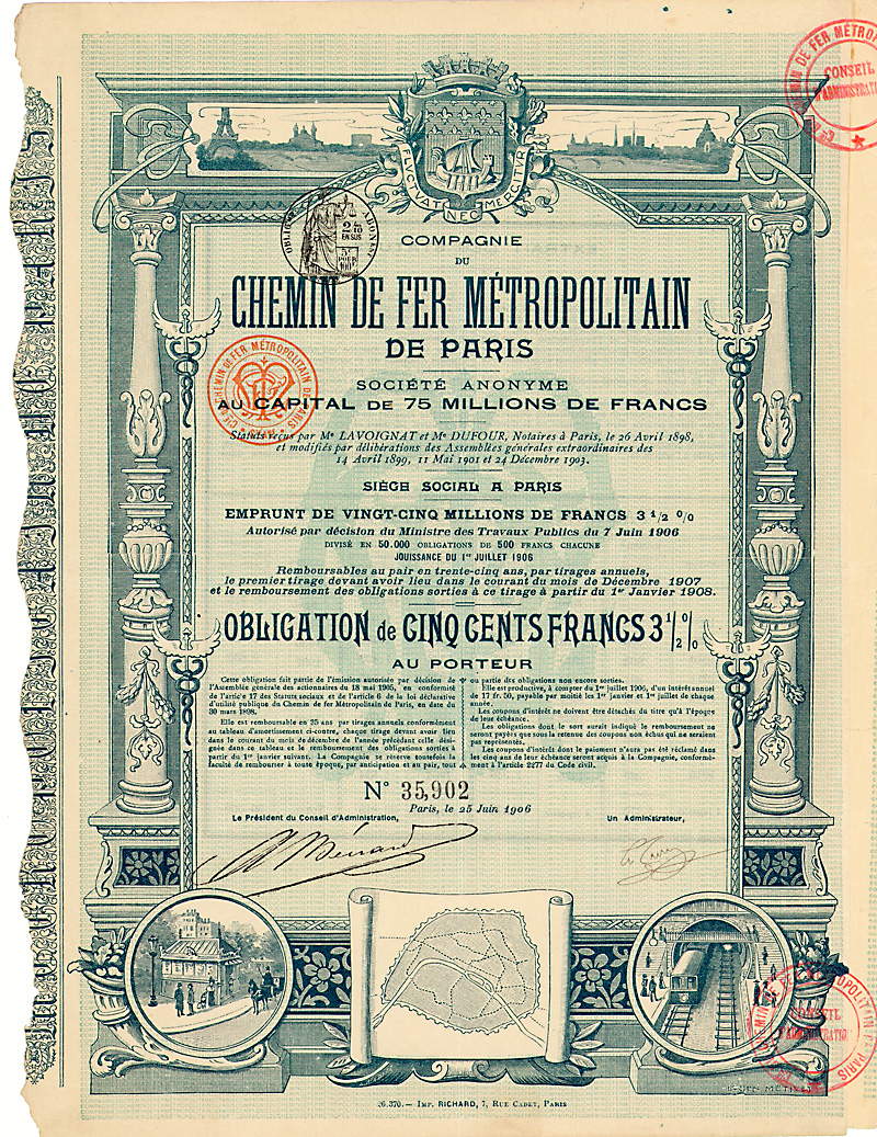 Obligation of the CdF Metropolitain de Paris S.A. from the 25. June 1906